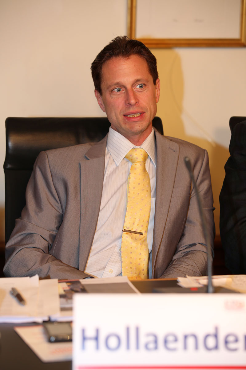 Dr. Adrian Hollaender-4978